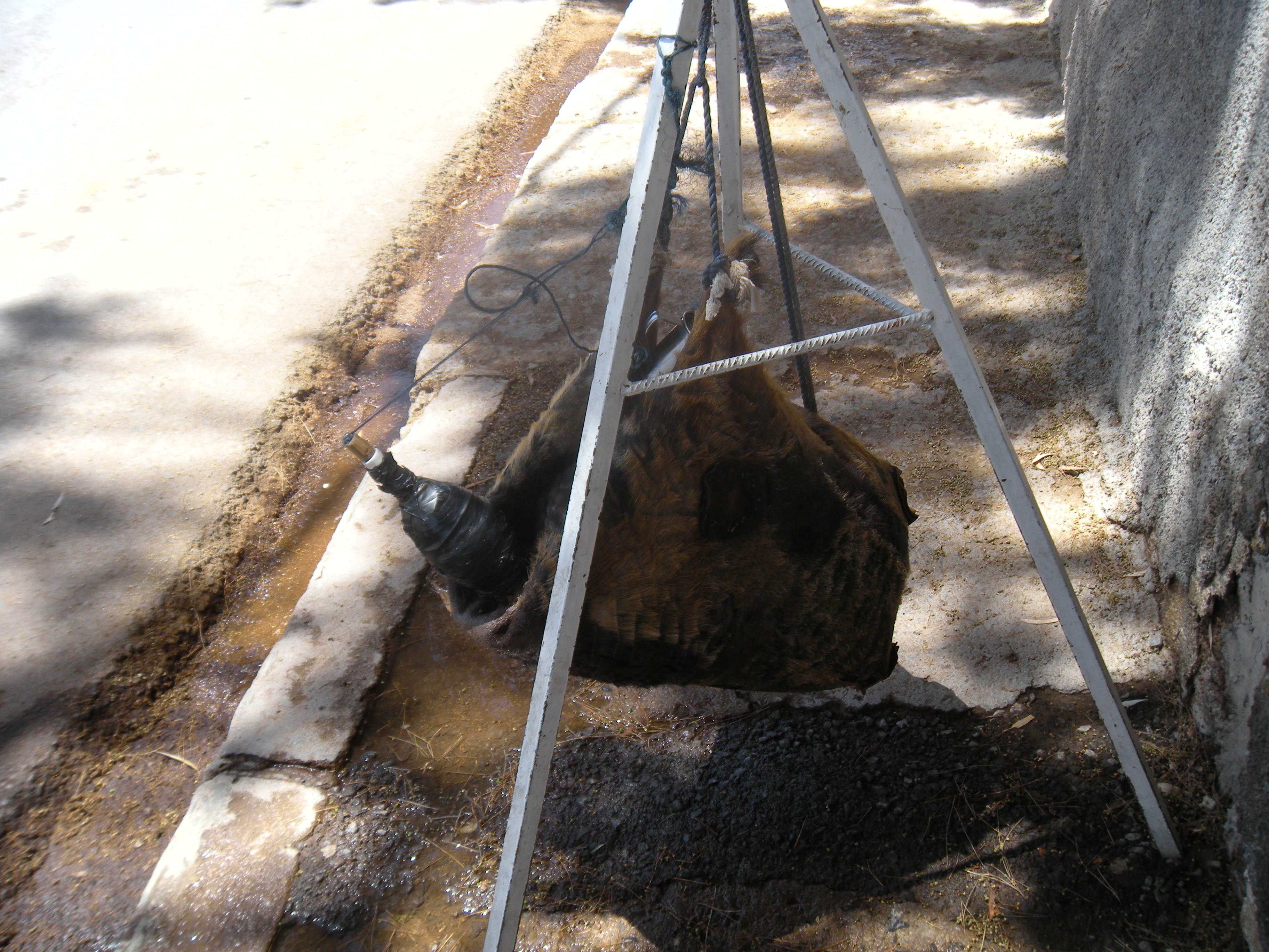 Guerba , l'outre des Aurès en Algérie, à Batna.